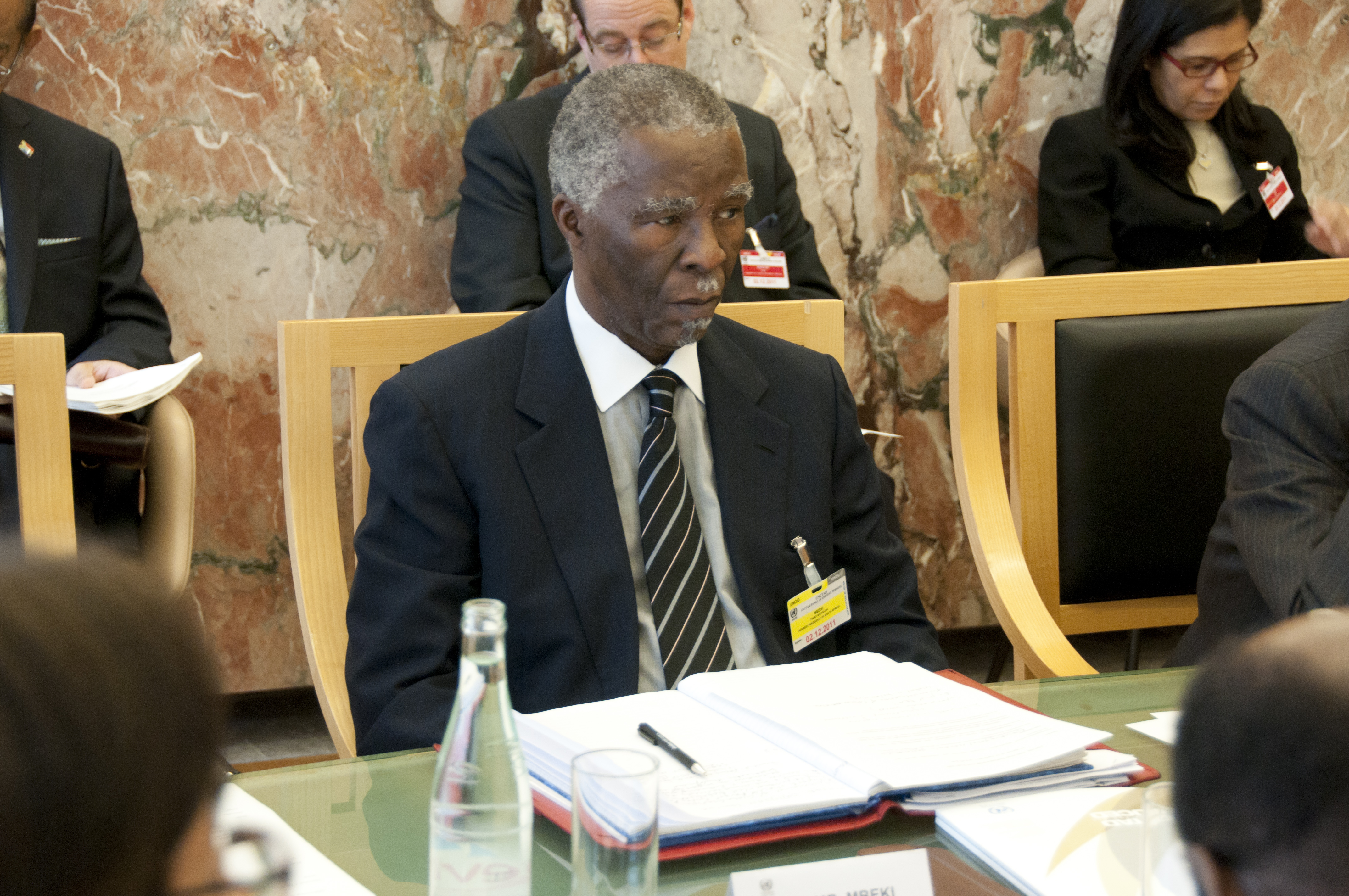 UNCTAD SG MEETING_DSC7867